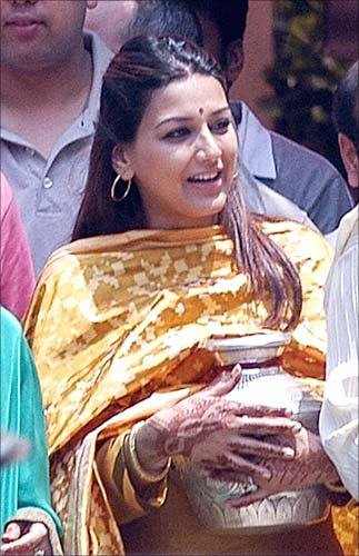 Sonali Bendre